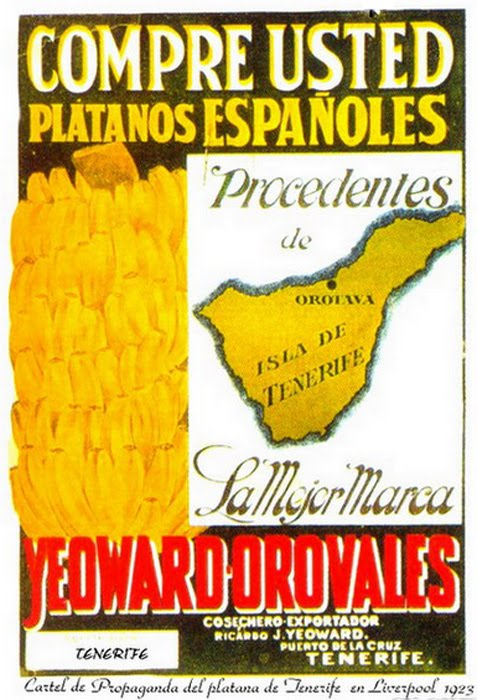 Publicidad en Liverpool, 1923